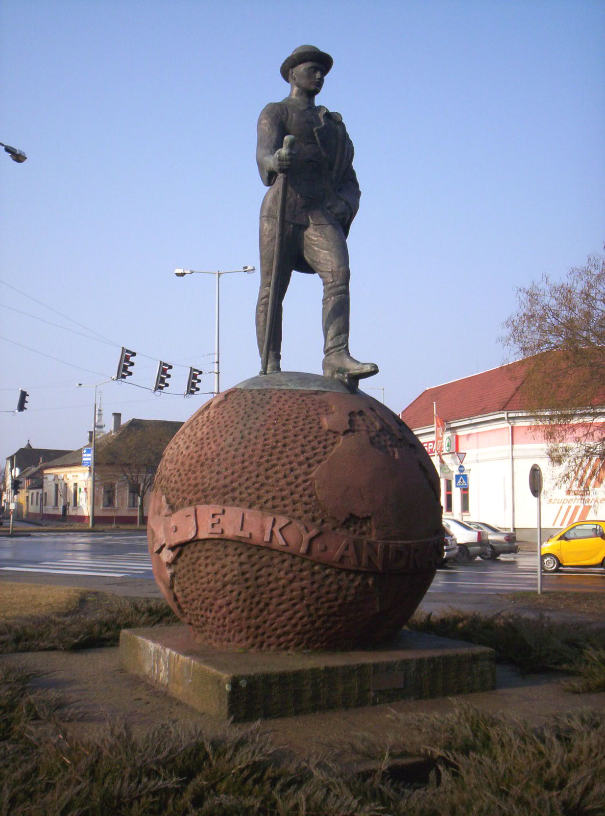 Jelky András szobra Baján. A szobor Medgyessy Ferenc, a földgömb Miskolczy Ferenc alkotása. – photo taken by uploader User:Csanády in 2006.